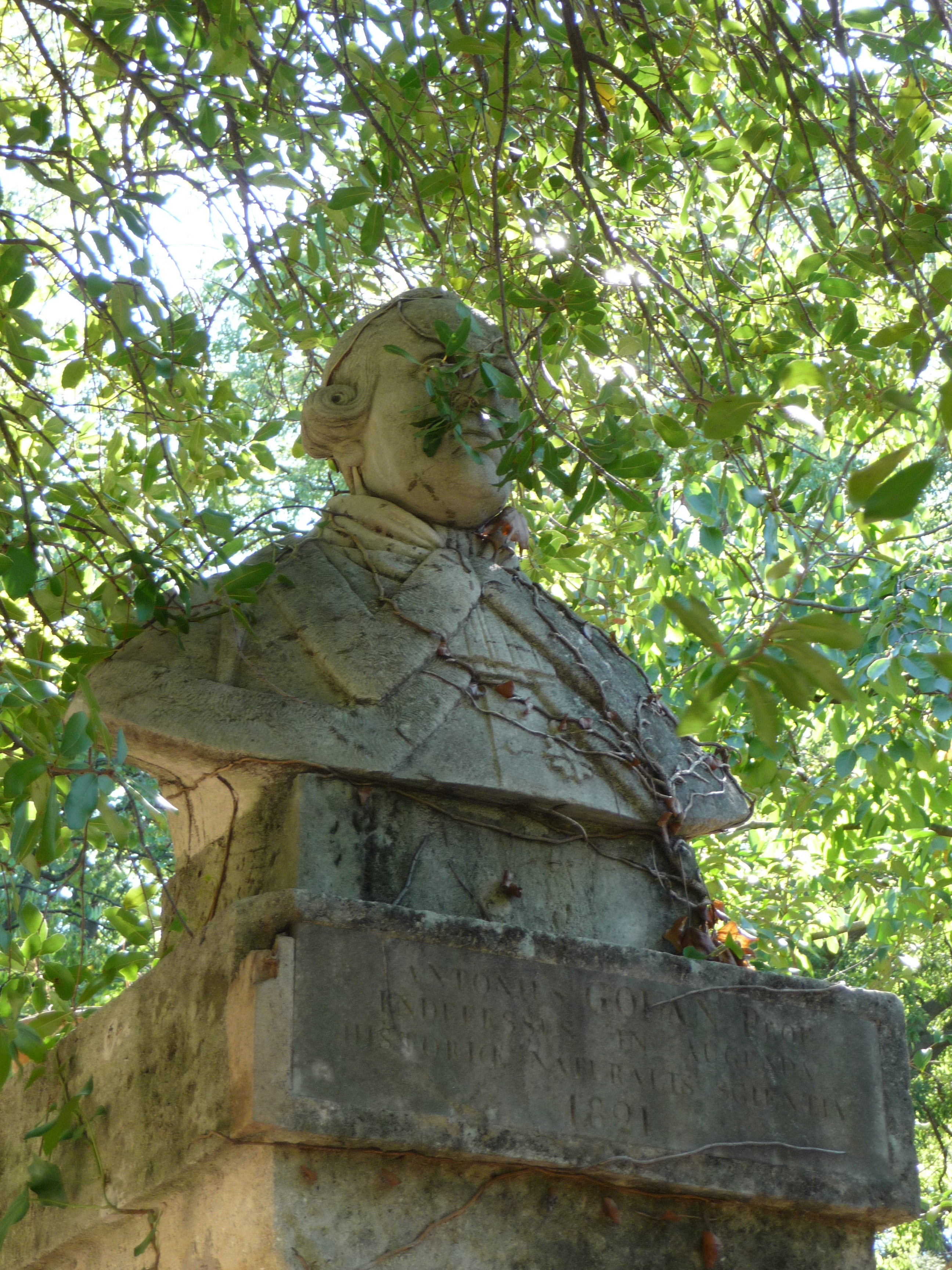 Bust d'Antoine Gouan al Jardí Botànic de Montpeller .